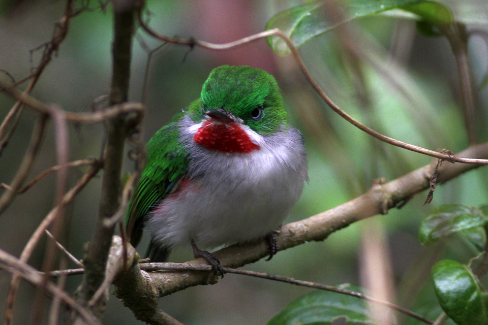 Sierra Baerucu National Park Upper reaches